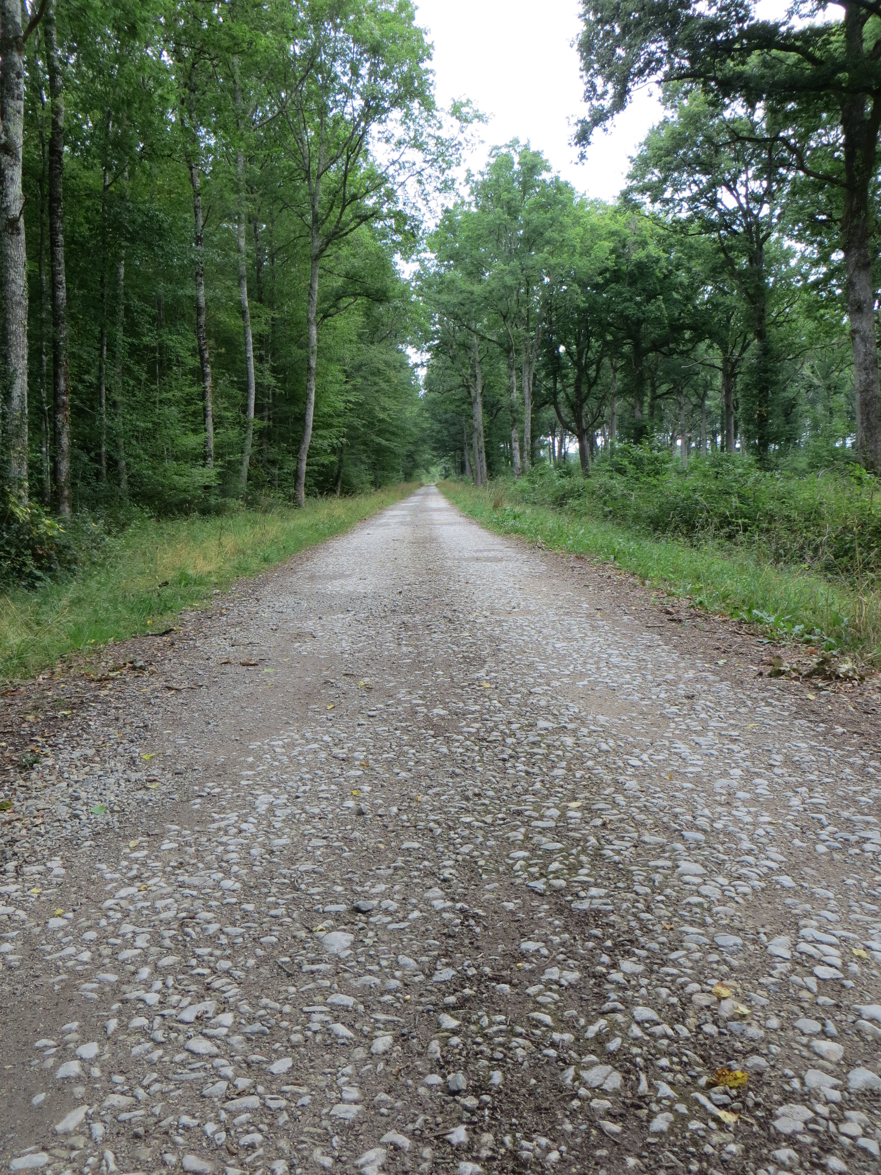 Vue générale du tronçon de voie romaine